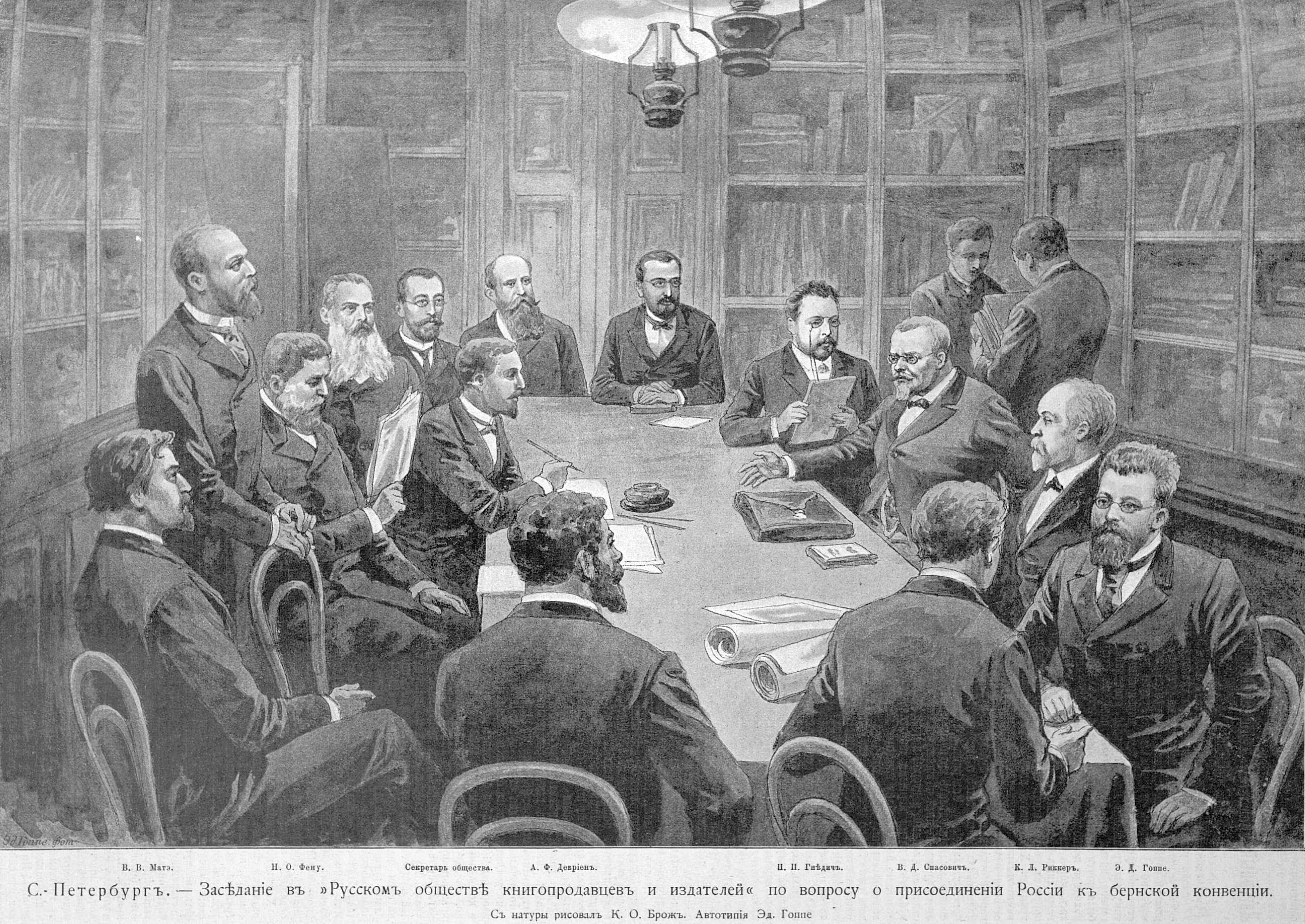 Заседание Русского общества книгопродавцев и издателей, 1893 год.